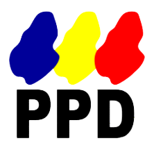 Emblema del Partido por la Democracia.